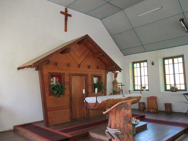 Choeur de la Chapelle de Vallon